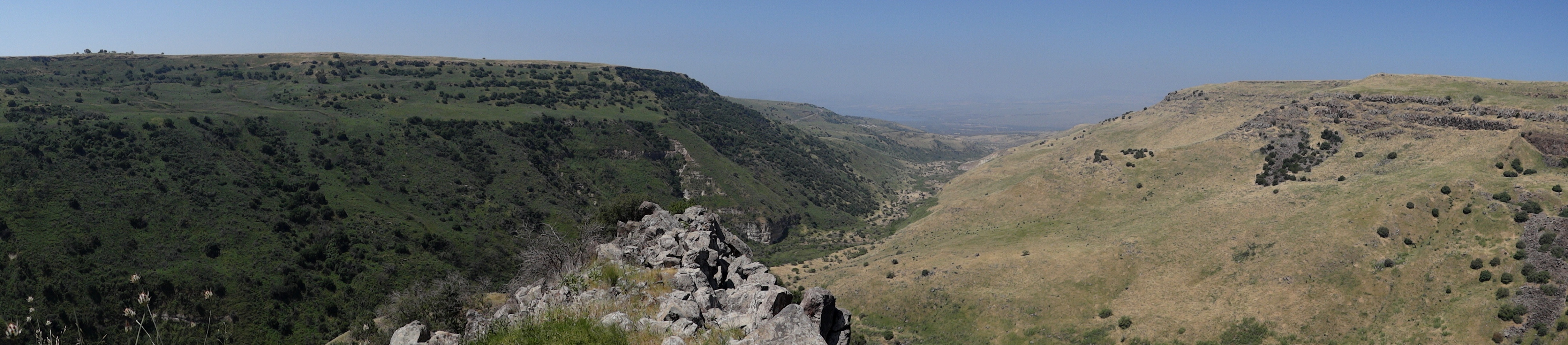 Gamla Nature reserv in Golan Heights גמלא היא שמורת טבע ואתר ארכאולוגי במרכז רמת הגולן, כ-20 קילומטרים דרומית לקצרין. נחל דליות במורד לכיוון הכנרת. תצפית מגמלא העתיקה